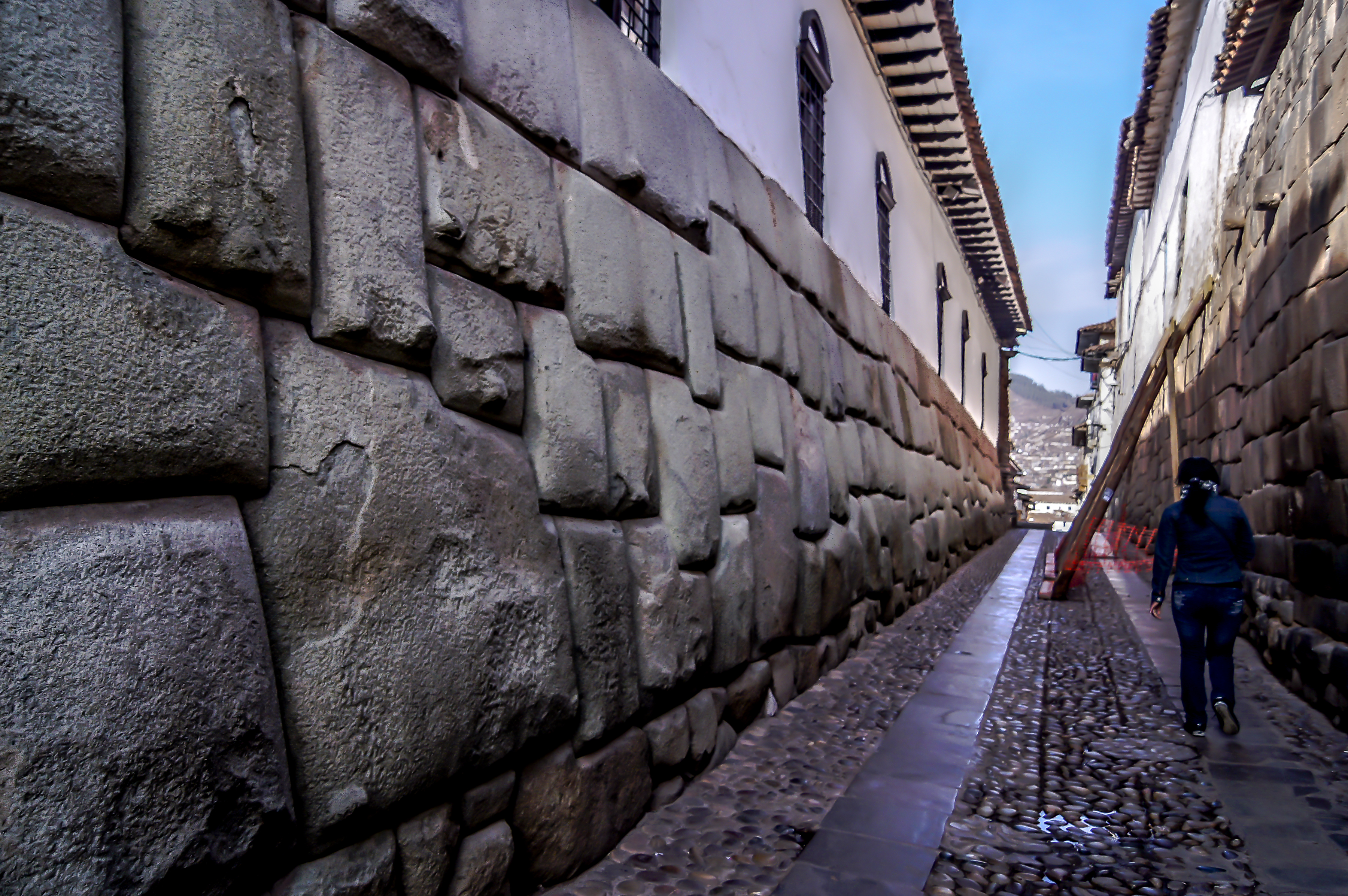 La piedra de los doce ángulos, en calle Hatun Rumiyoc, Cuzco